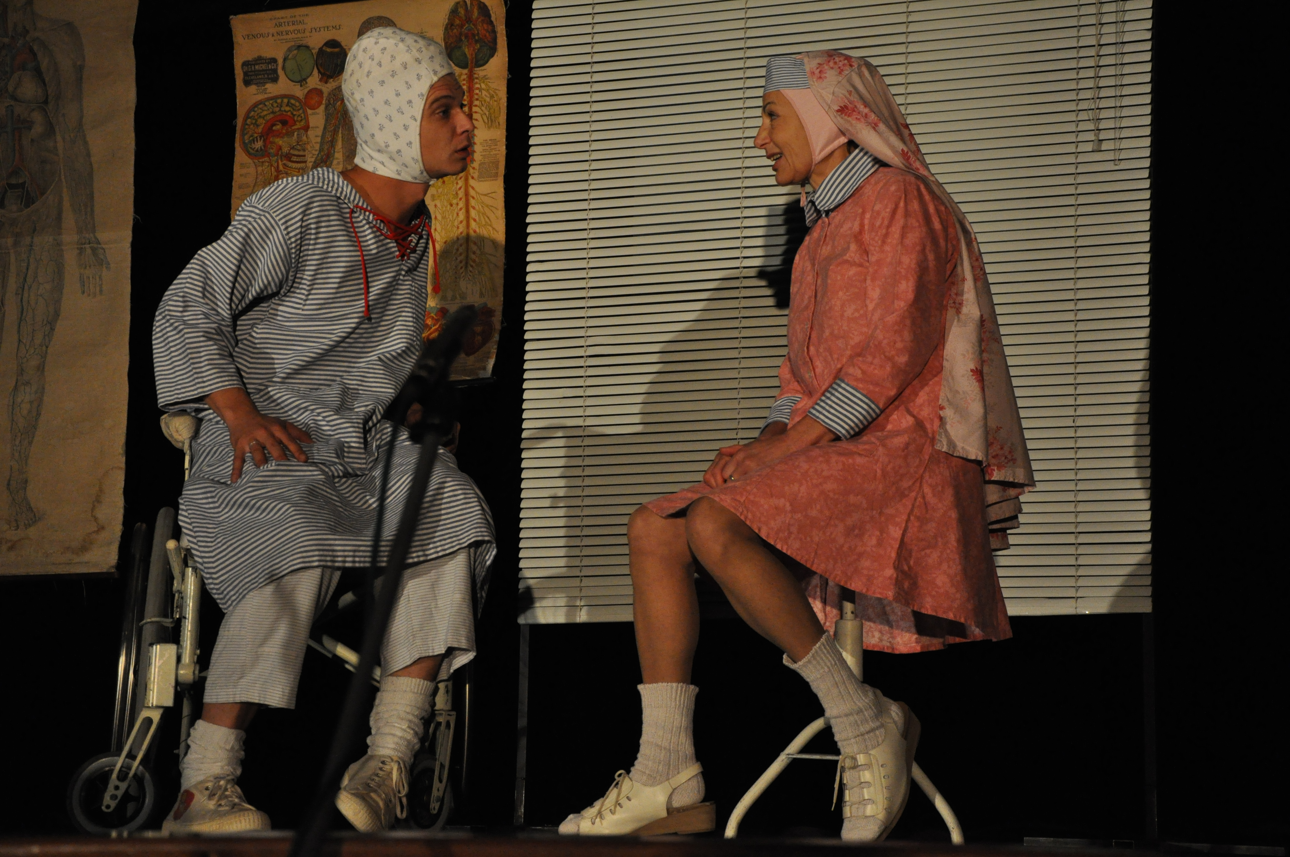 Jan Sklenář a Martina Eliášová, inscenace Klicperova divadla